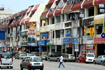 Shophouses at Bintulu town, Sarawak, Malaysia.